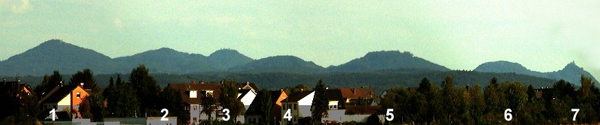 Siebengebirge bei Bonn, Germany